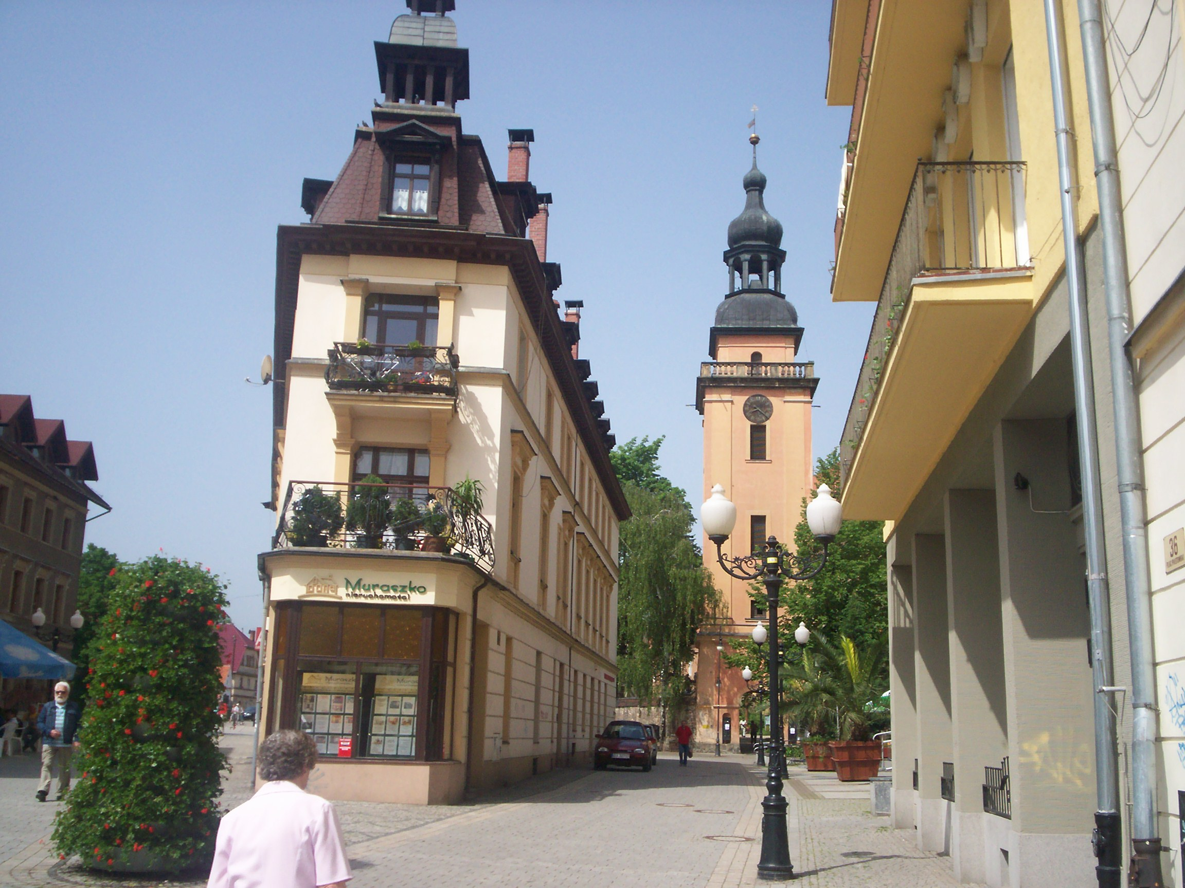 Cieplice Śląskie-Zdrój, Długi Dom.